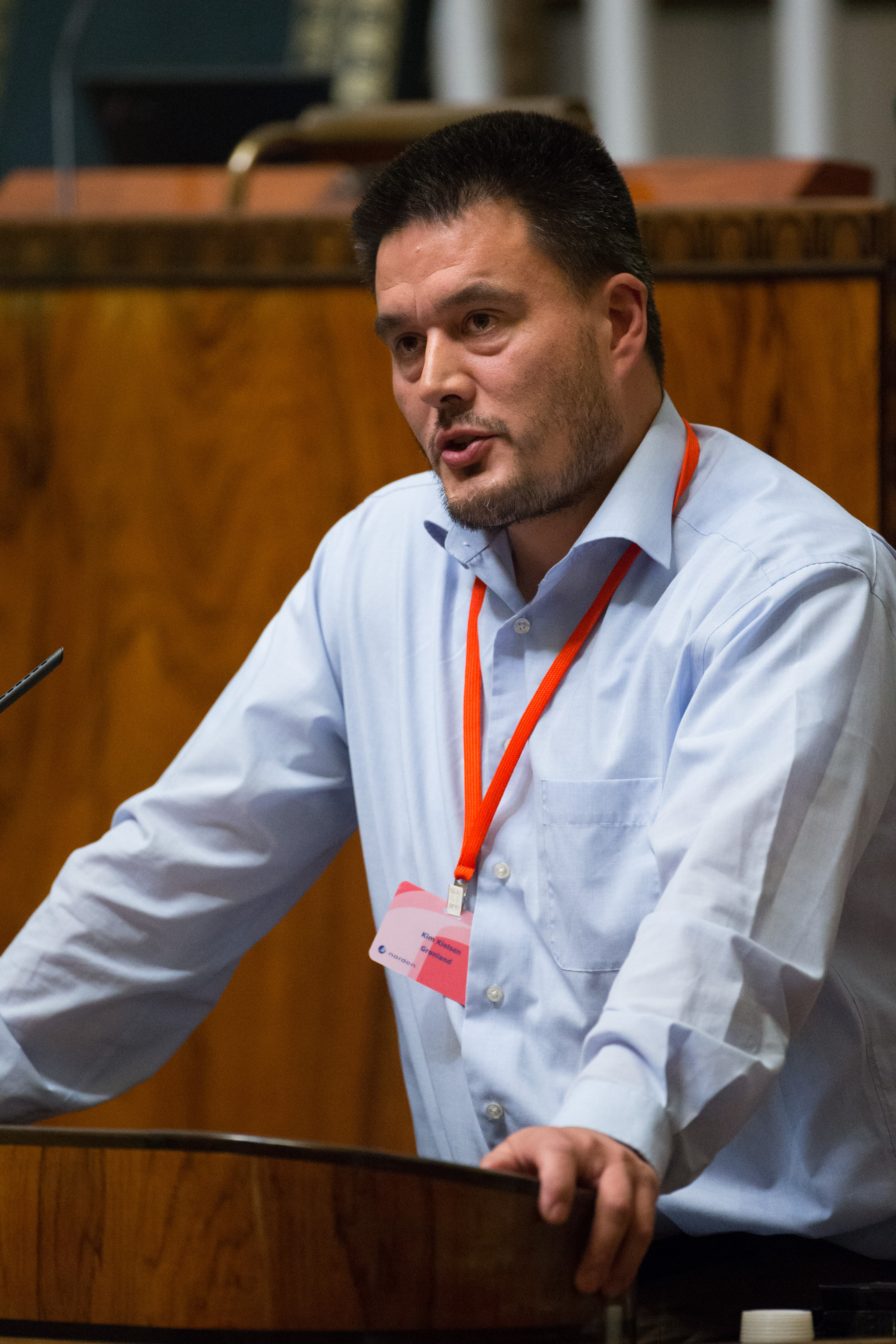 Kim Kielsen. Nordiska råŒdets session i Helsingfors 2012.